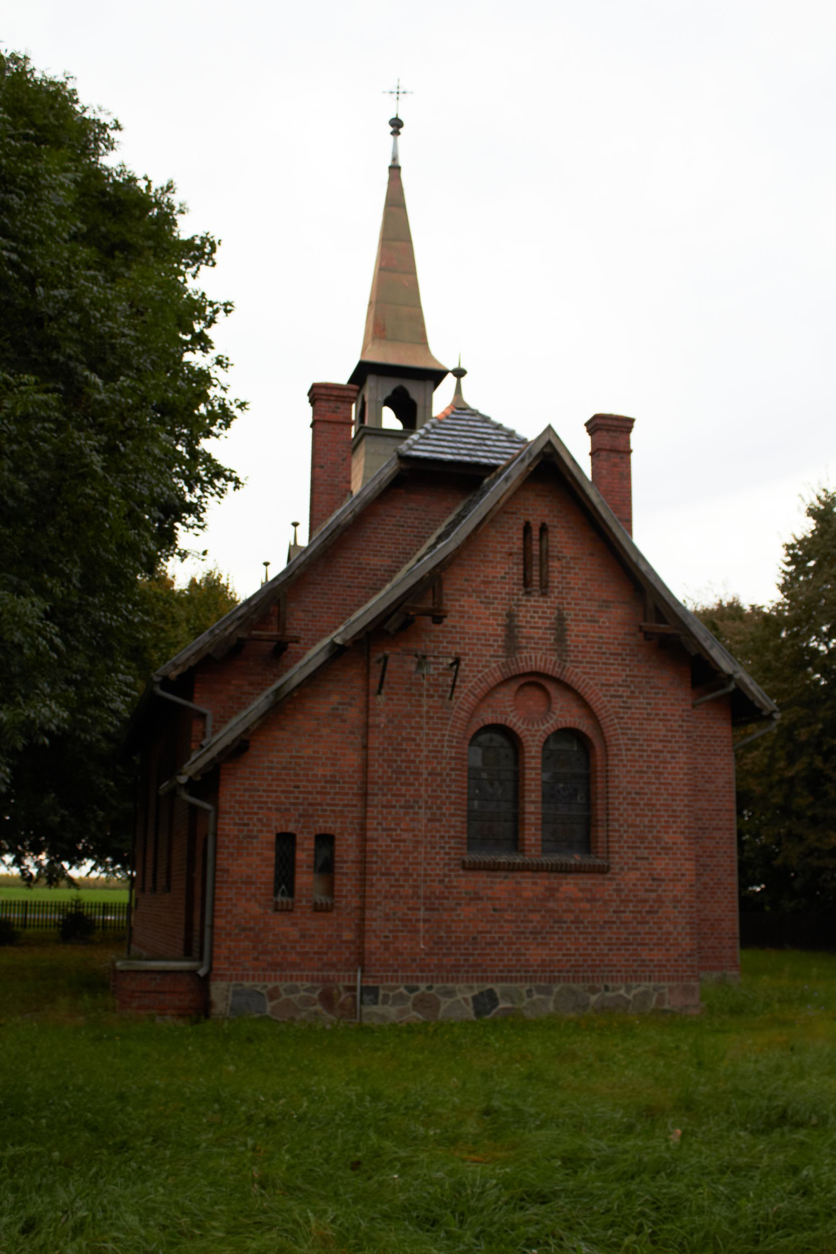 Poręba, kościół ewang., ob. rzym.-kat. fil. pw. Niepokalanego Serca NMP, 1896